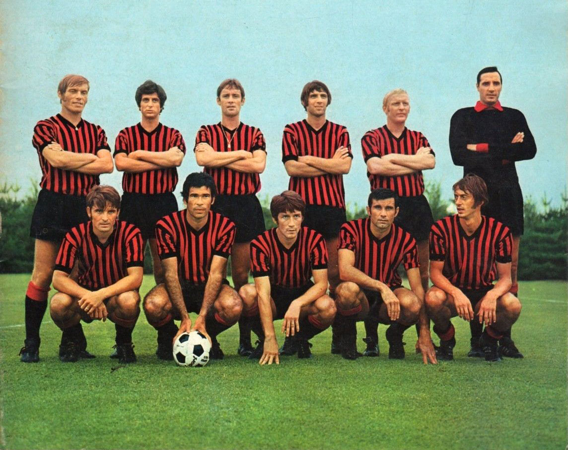 Una formazione del Milan nella stagione 1970-71.